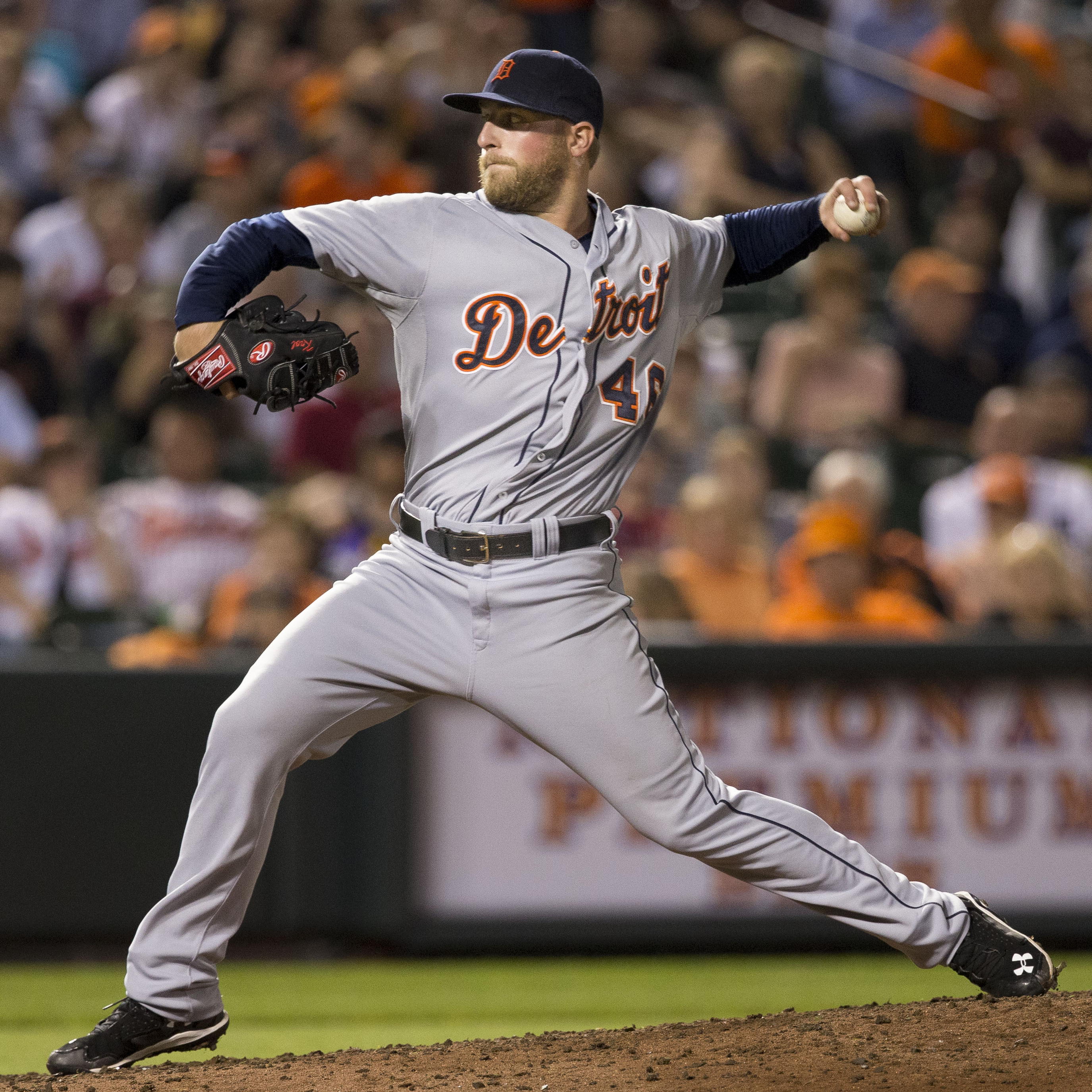 Ian Krol